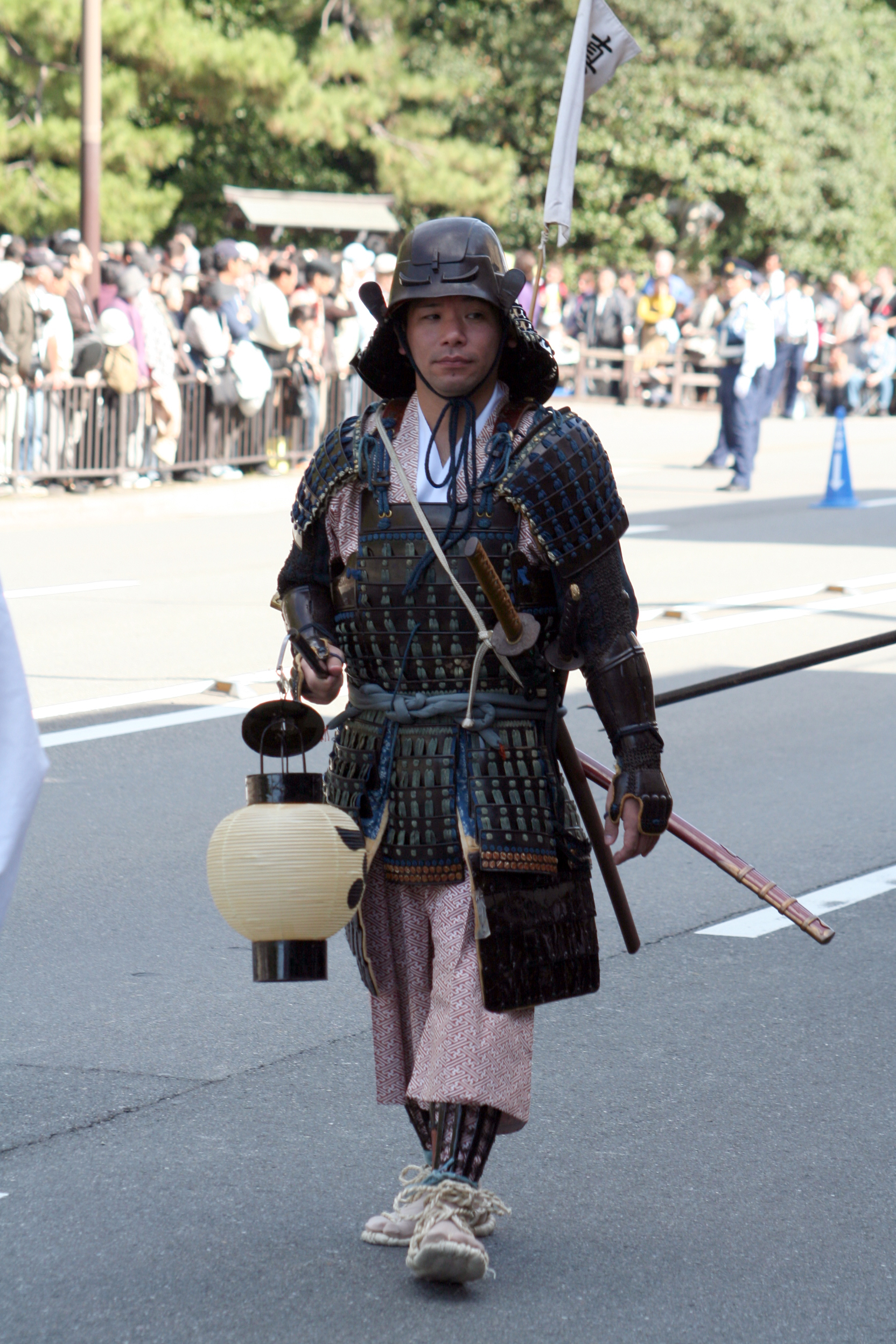 京都府京都市にて開催された時代祭。正午の御所から平安神宮までの行進の様子。2009年10月22日撮影。